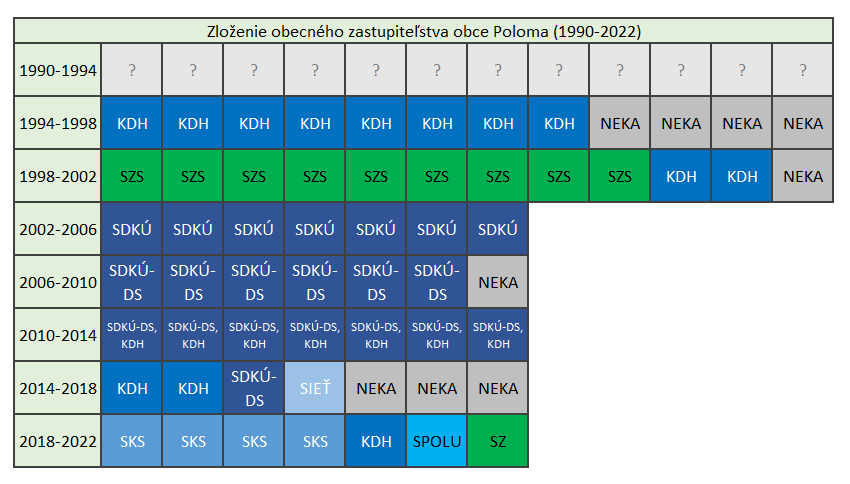 Zloženie obecného zastupiteľstva obce Poloma (1990-2022). Každé pole predstavuje jedného poslanca. NEKA = nezávislý kandidát.